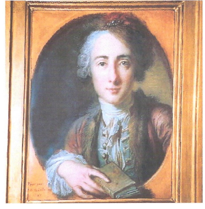 Huile sur toile